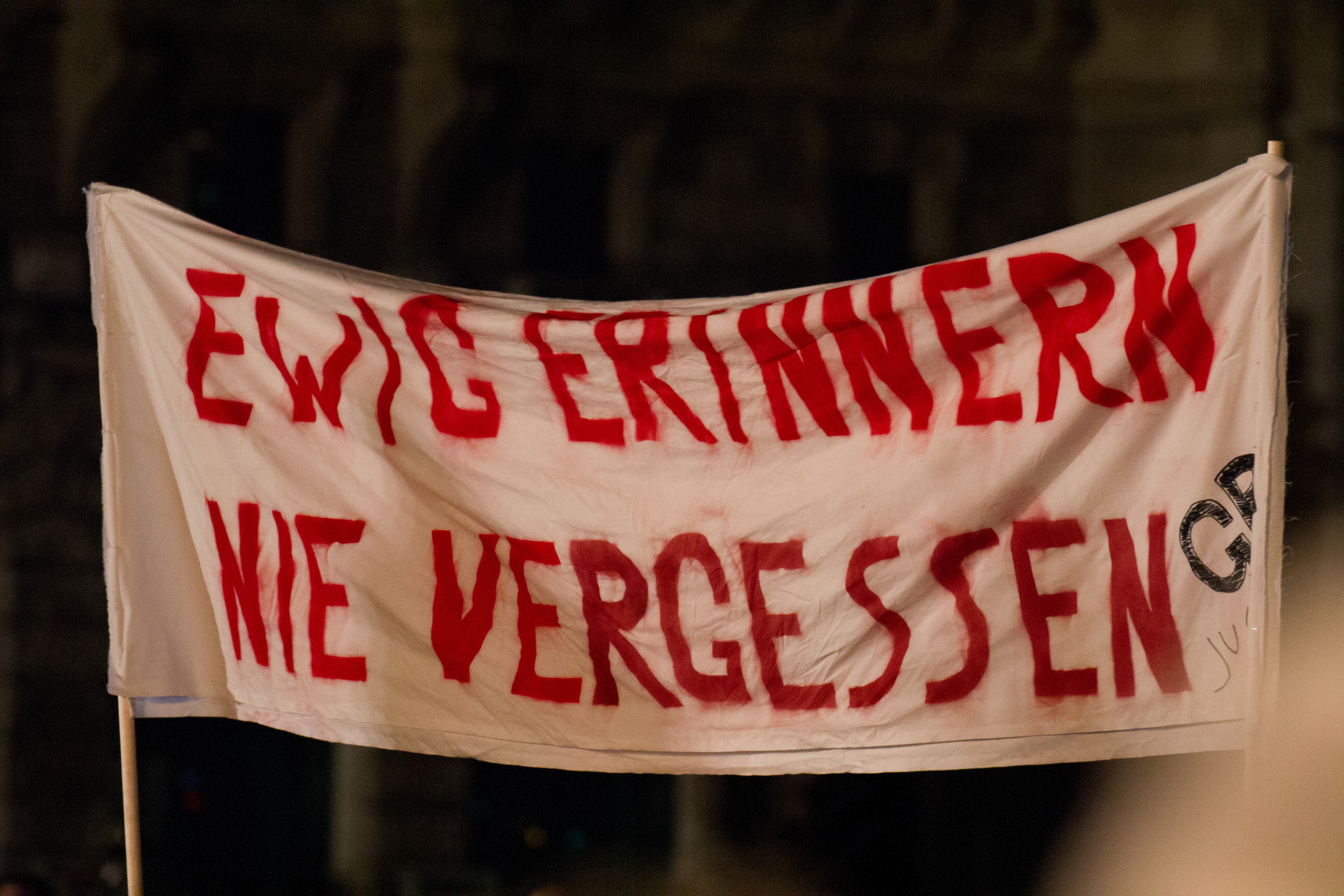 Kundgebung "Jetzt Zeichen setzen" gegen den WKR-Ball 2012